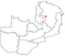 Sambiakarte mit Chilubi